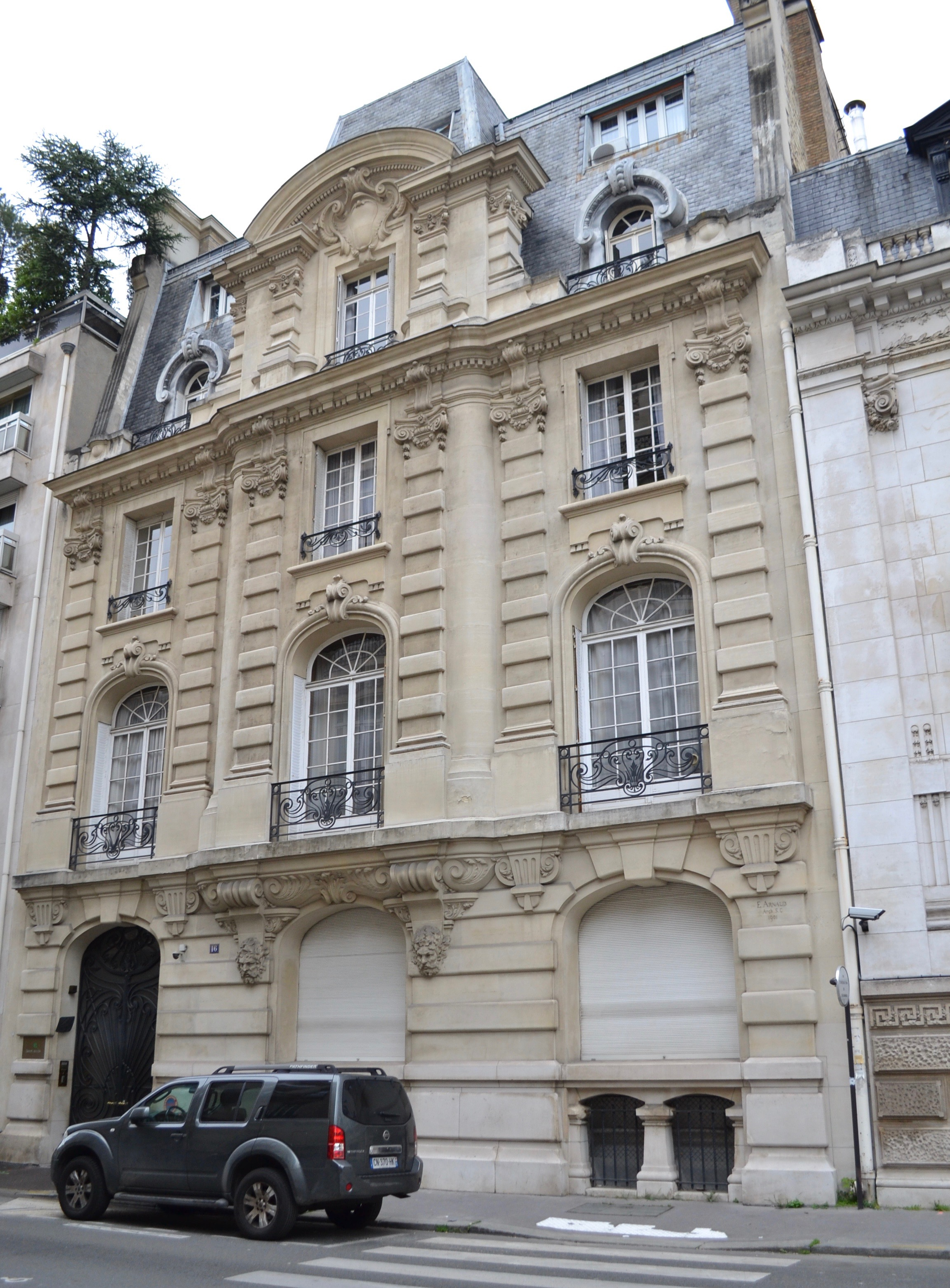 Rue Octave-Feuillet, Paris, 16e arrondissement.